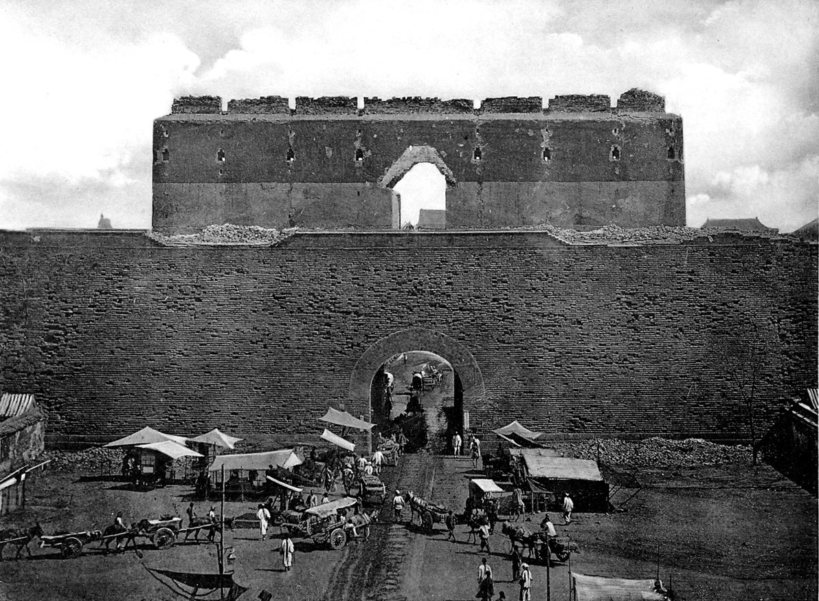 Innerer Durchgang des Chienmên. (Thurm ist bei der Einnahme verbrannt und später ganz entfernt worden.)